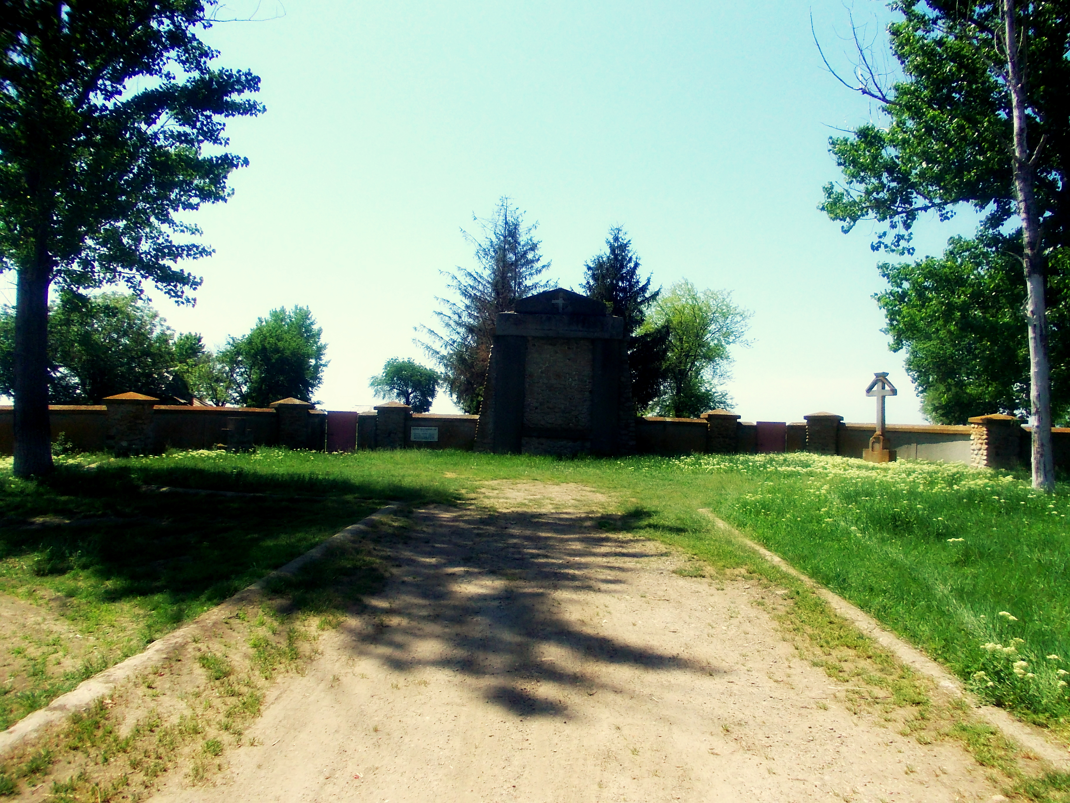 Cimitirul ostașilor germani (1916 - 1919) - exterior - vedere frontală